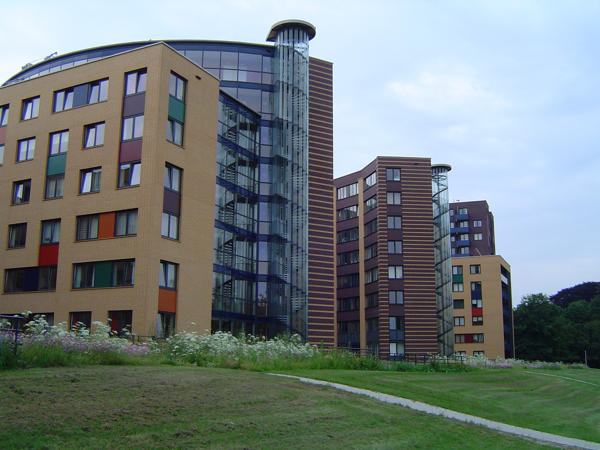 Radboud, habitations d'étudiants